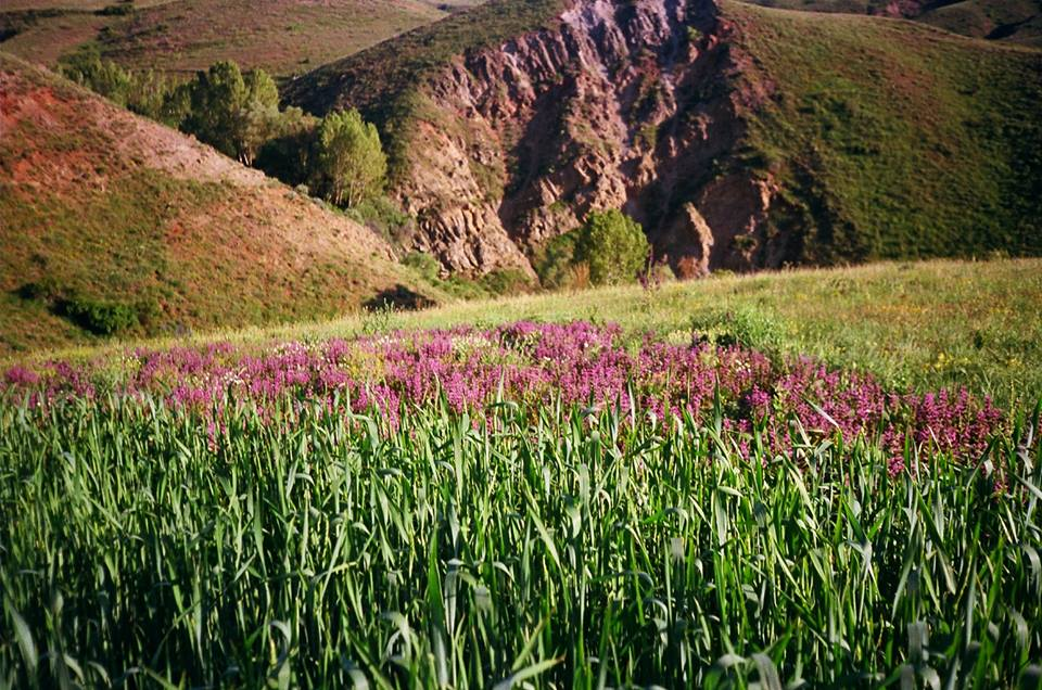 Kaymak köyü bahar